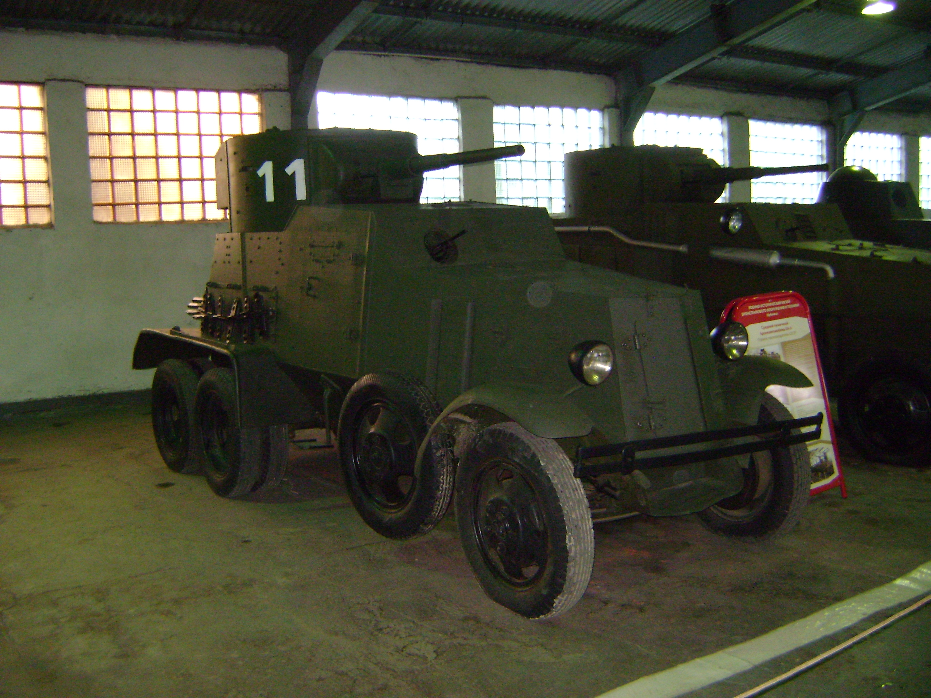 Tank Museum, Kubinka